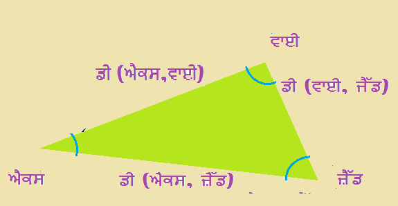 ਪੰਜਾਬੀ: ਤਿਕੋਣੀ ਅਸਮਾਨਤਾ